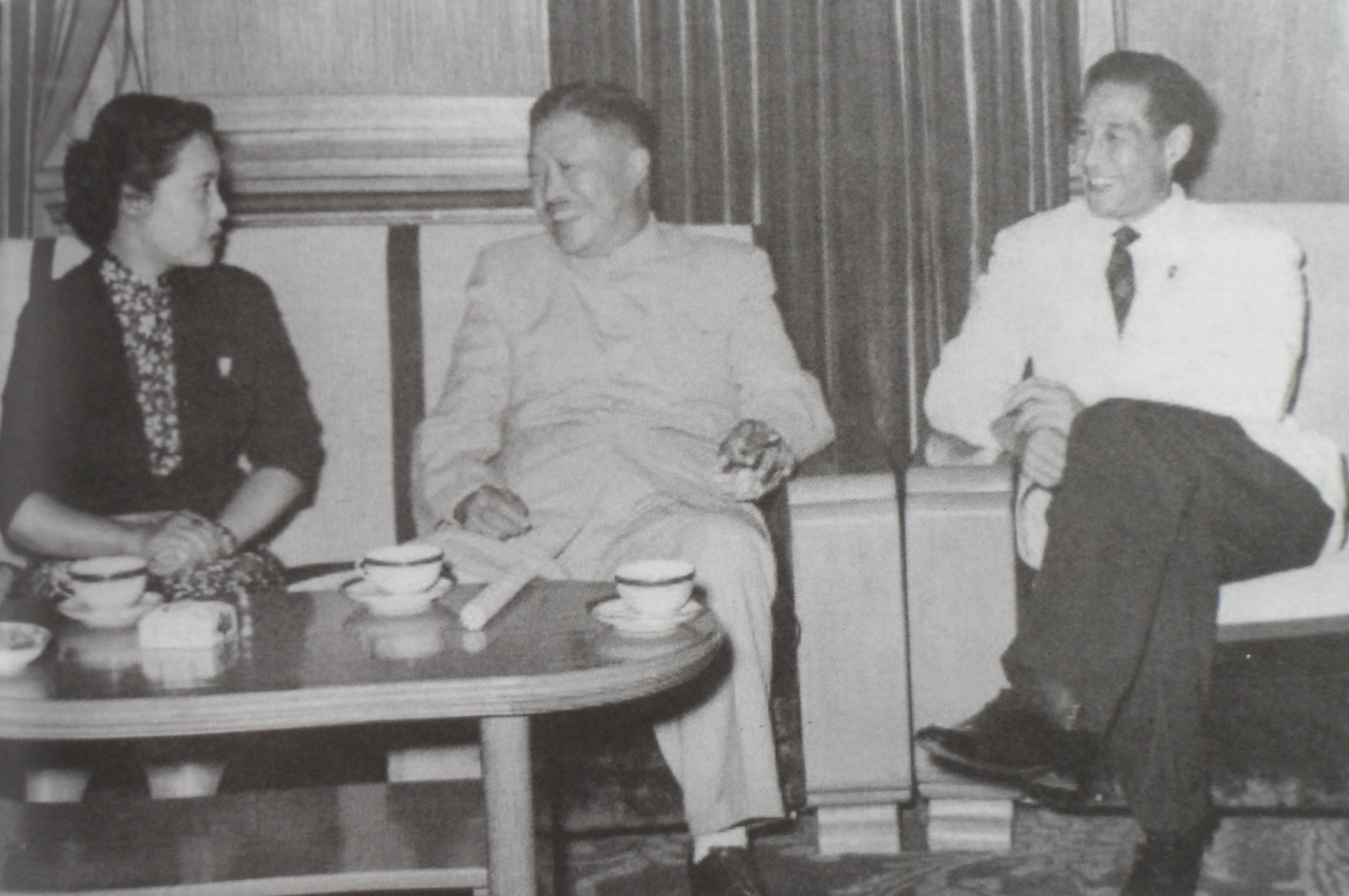 金焰秦怡与贺龙元帅